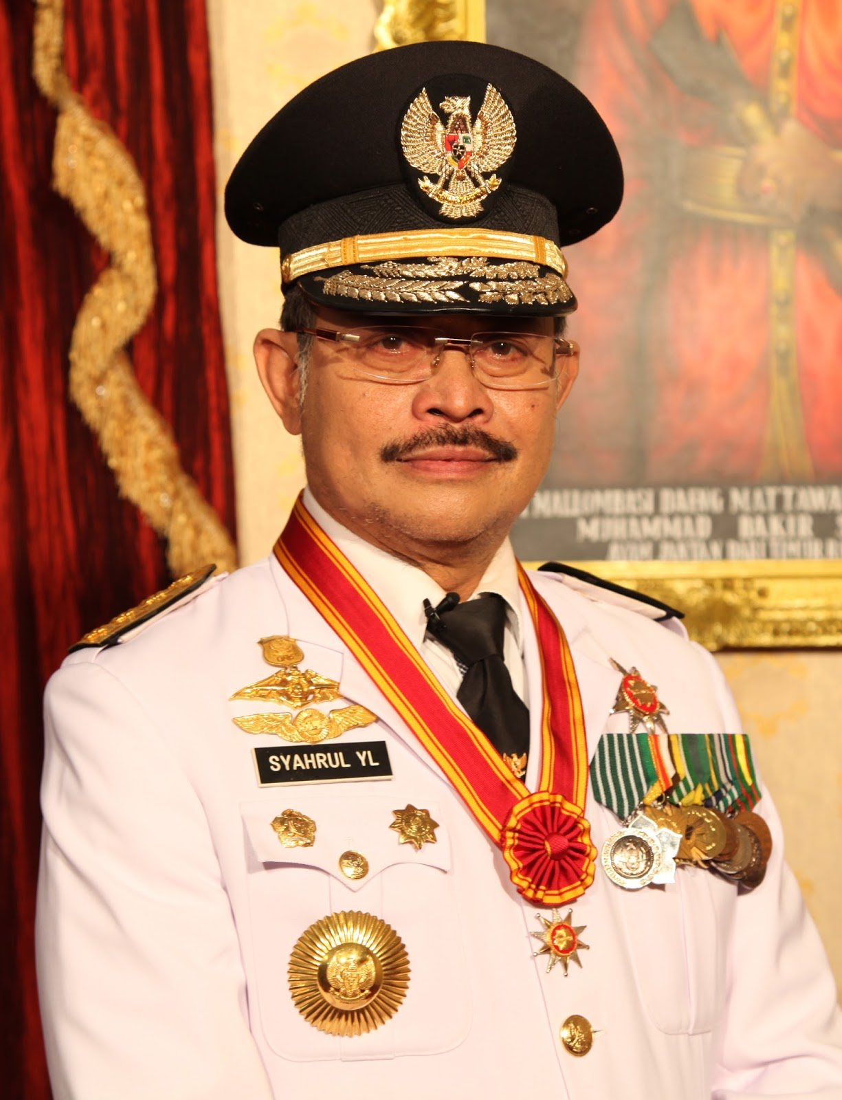 Gubernur Sulawesi Selatan